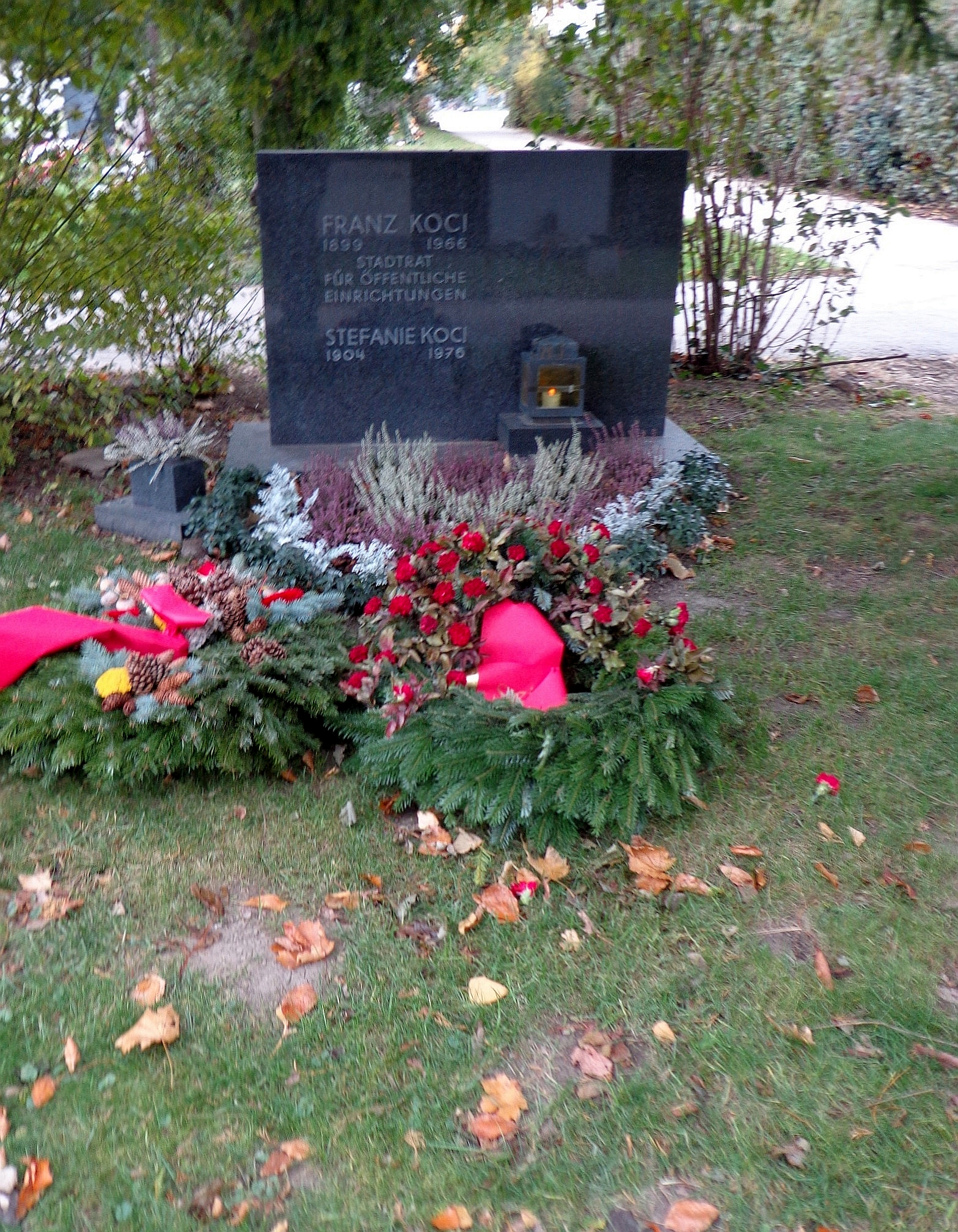 Wiener Zentralfriedhof - Gruppe 14 C, Ehrengrab von Franz Koci